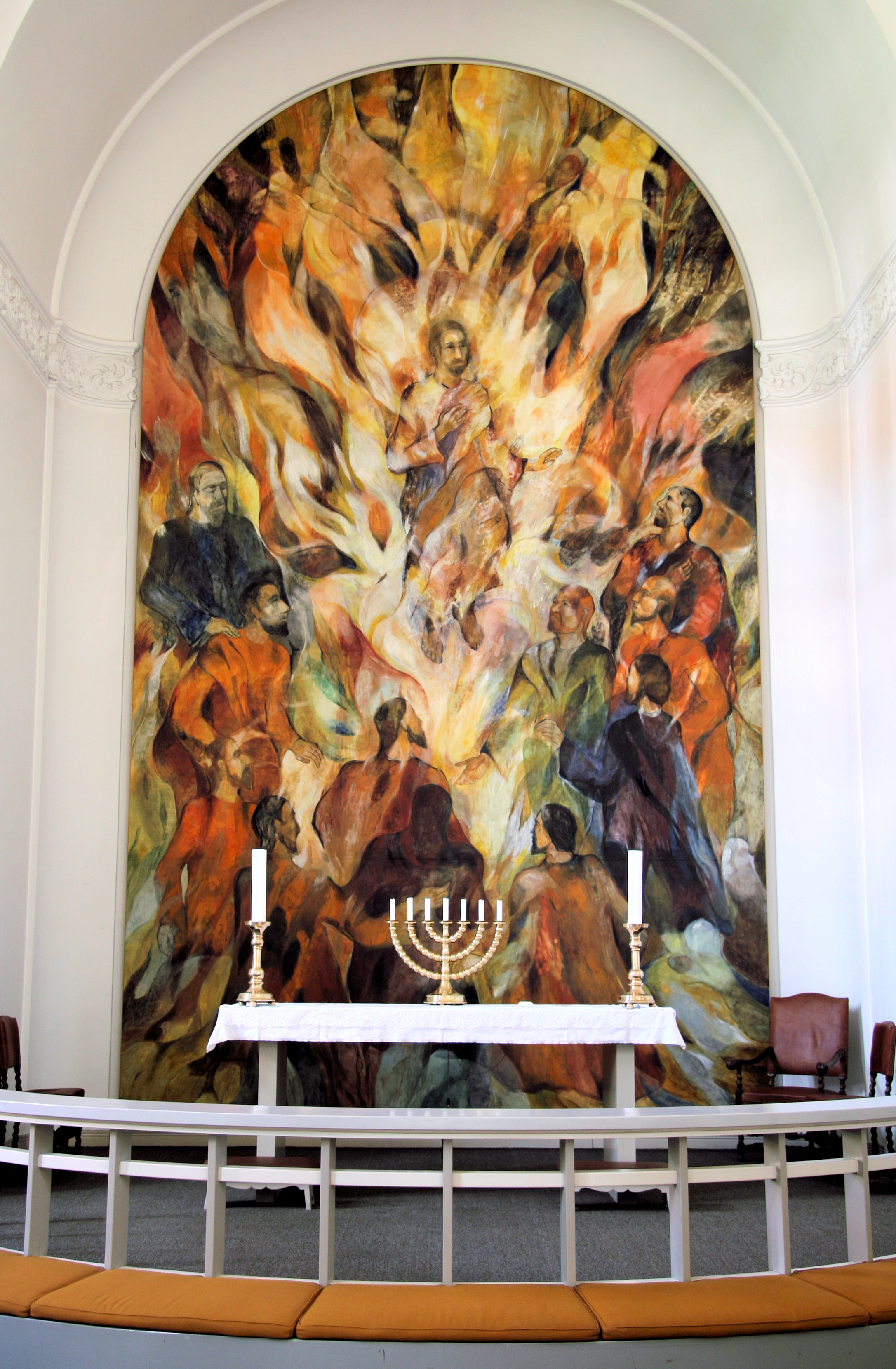 Solbjerg Kirke in Copenhagen, Denmark. Altar. Painting by Bodil Kaalund